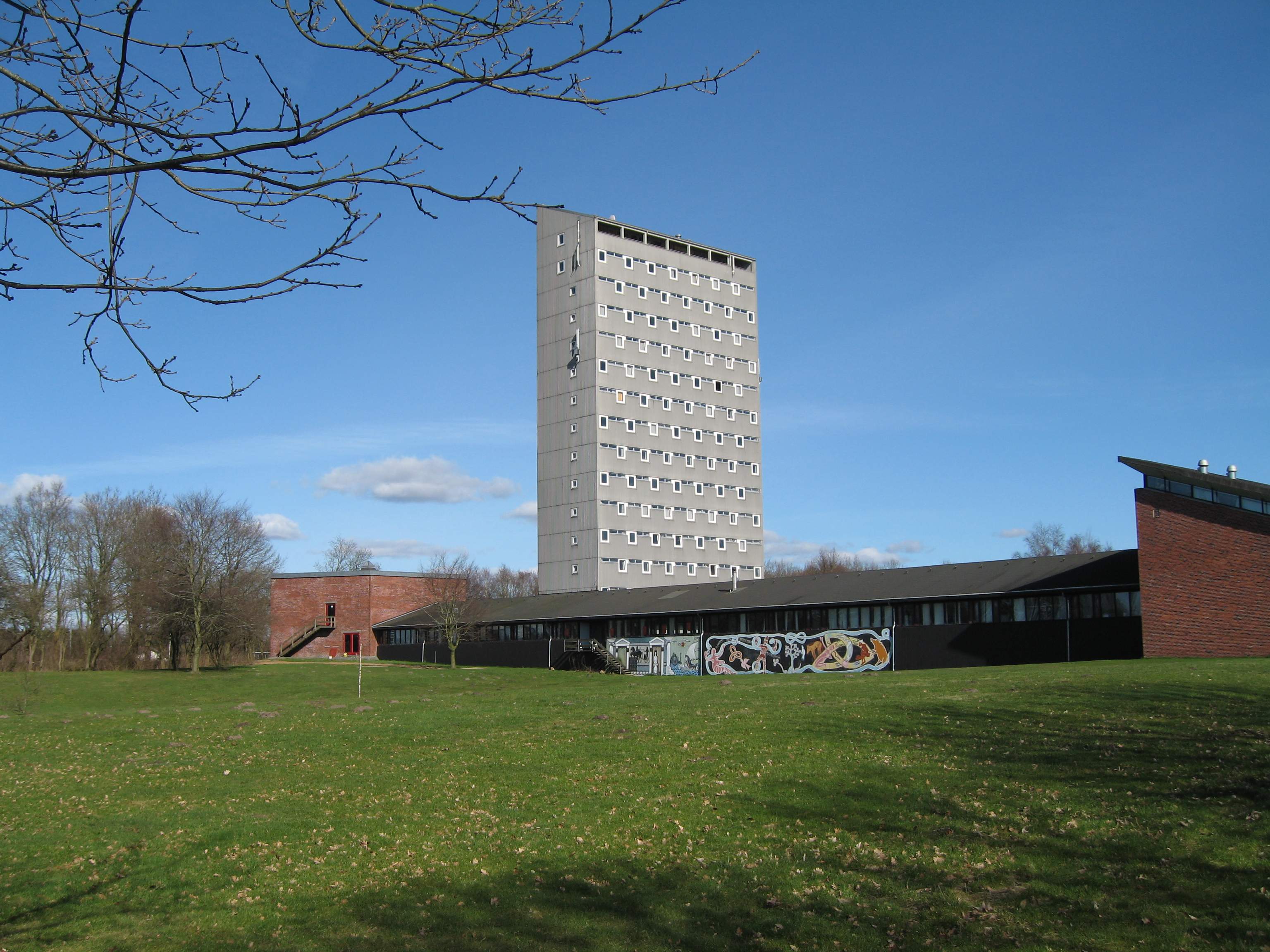 Herning nu nedlagte højskole